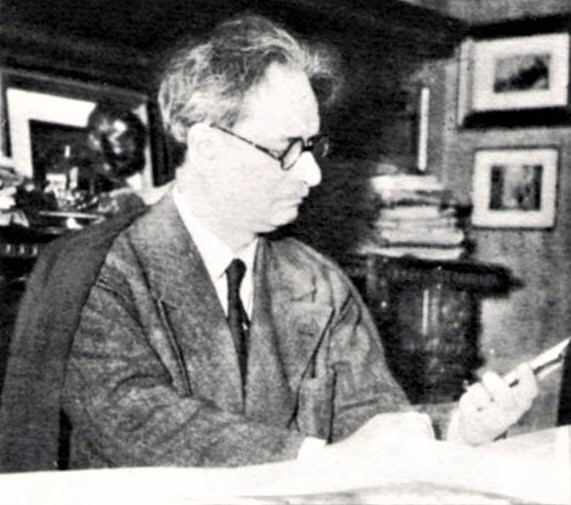 Alfredo Petrucci